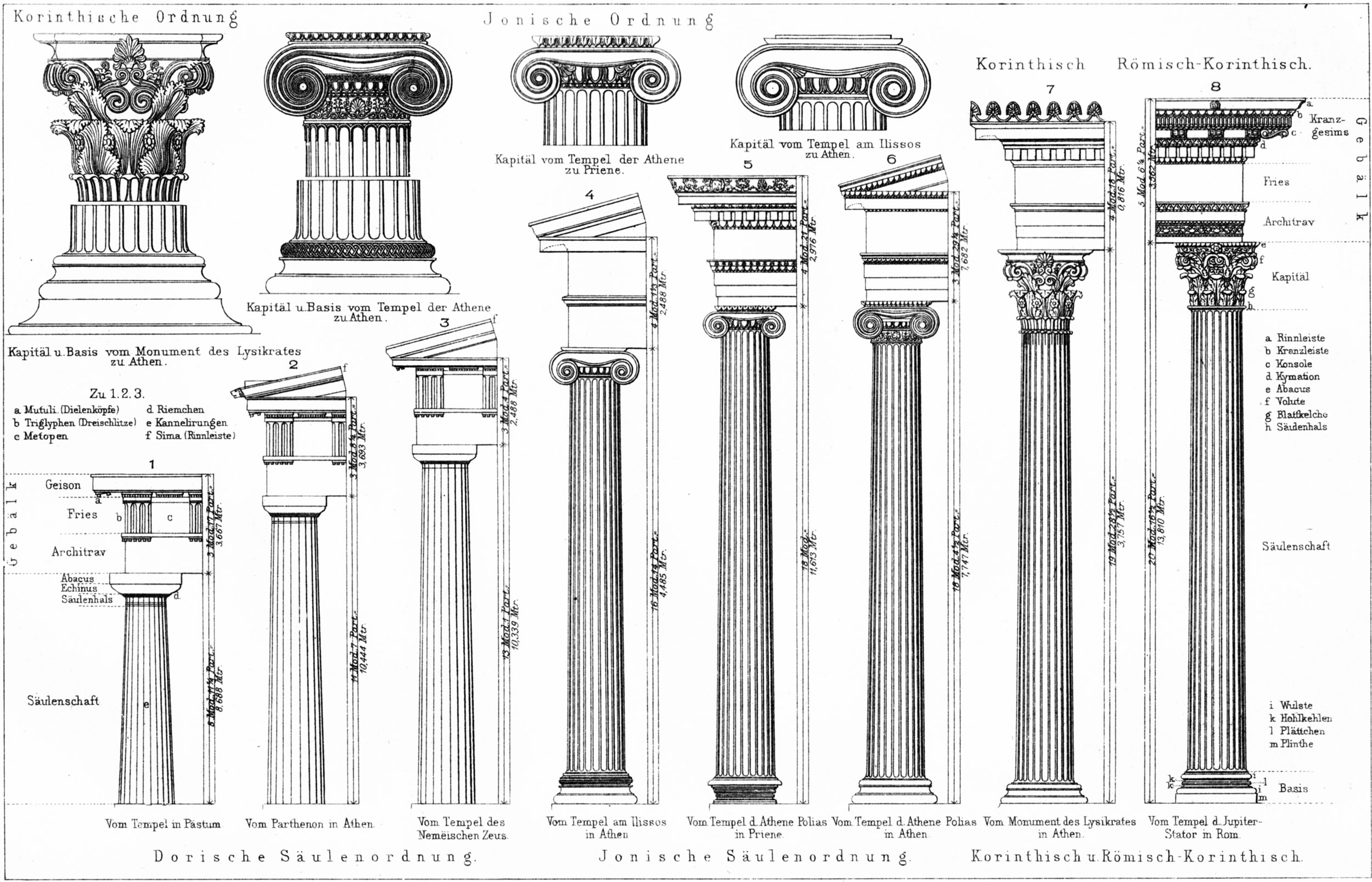 Die klassischen Säulenordnungen der Antike – Tafel zum Artikel „Baukunst“, S. 194